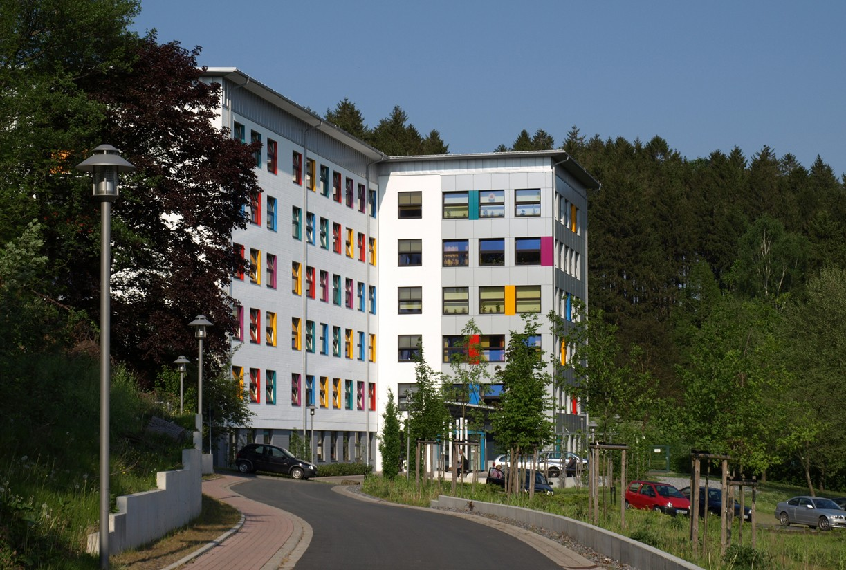 Gebäude der LWL-Klinik Warstein mit Stationen und der Zentralen Aufnahme